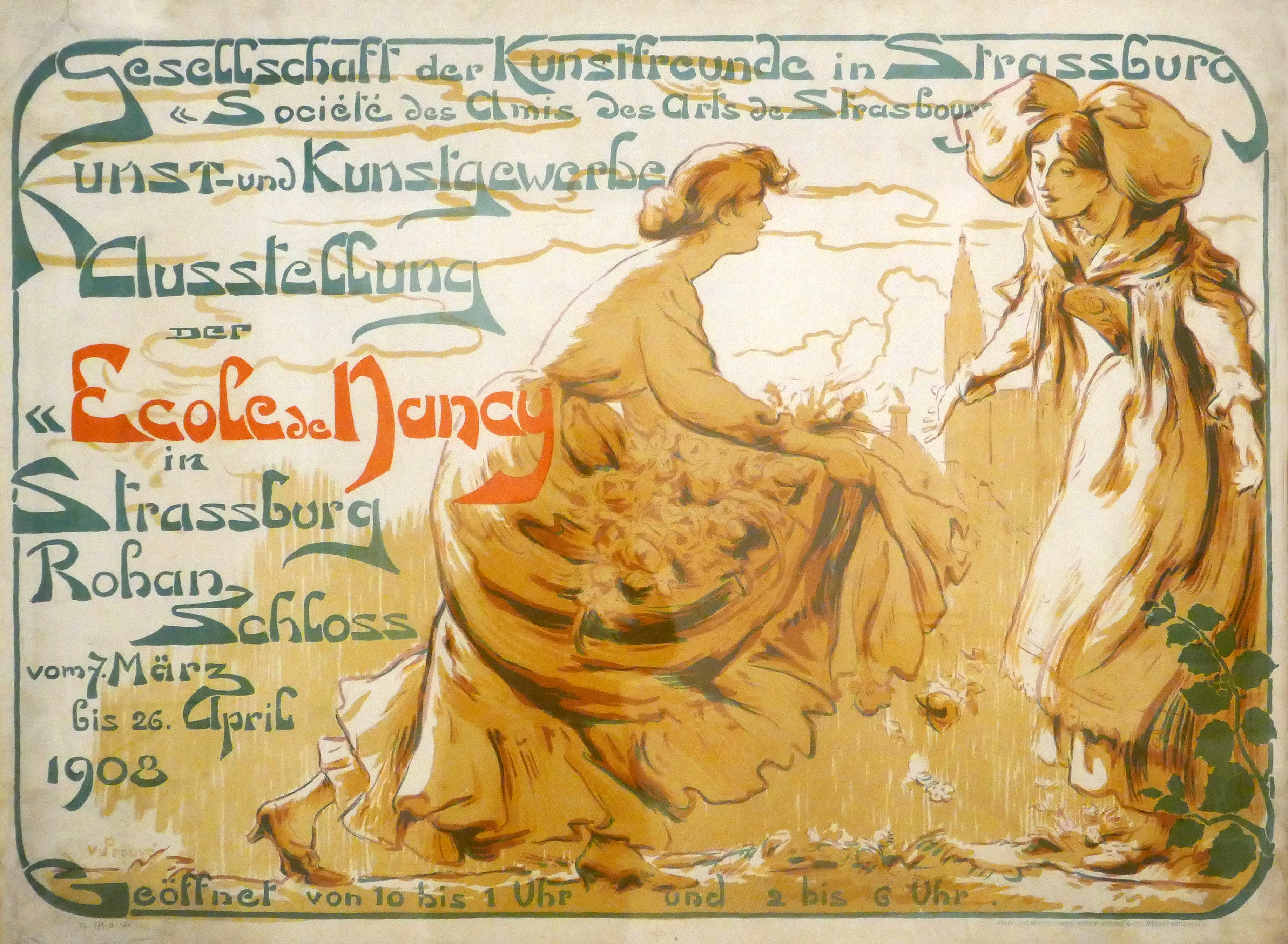 Victor Prouvé. Exposition d'art décoratif de l'Ecole de Nancy à Strasbourg (Palais Rohan, du 7 mars au 26 avril 1908). Lithographie en couleurs. Exposition Laboratoire d'Europe Strasbourg, 1880-1930 au Musée d'art moderne et contemporain de Strasbourg.